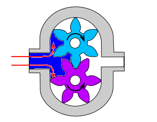 popis pracovních fází zubového čerpadla - fáze 1.